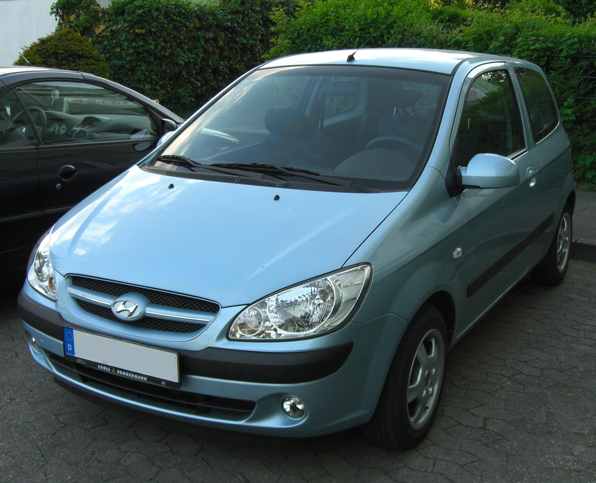 Hyundai Getz